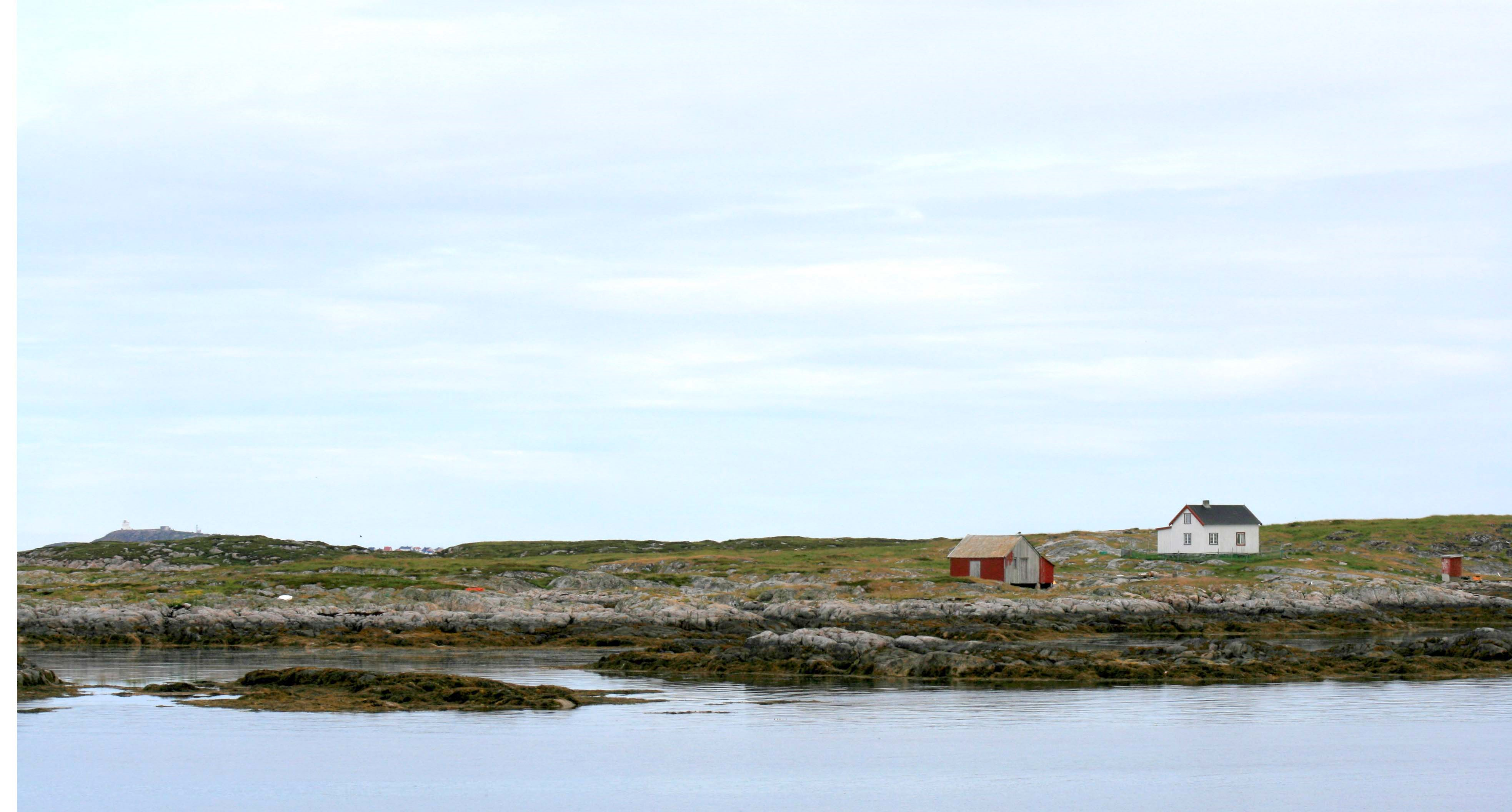 Norsk (bokmål):Vågsvær i Frøya